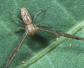 male Runcinia acuminata from Okinawa.